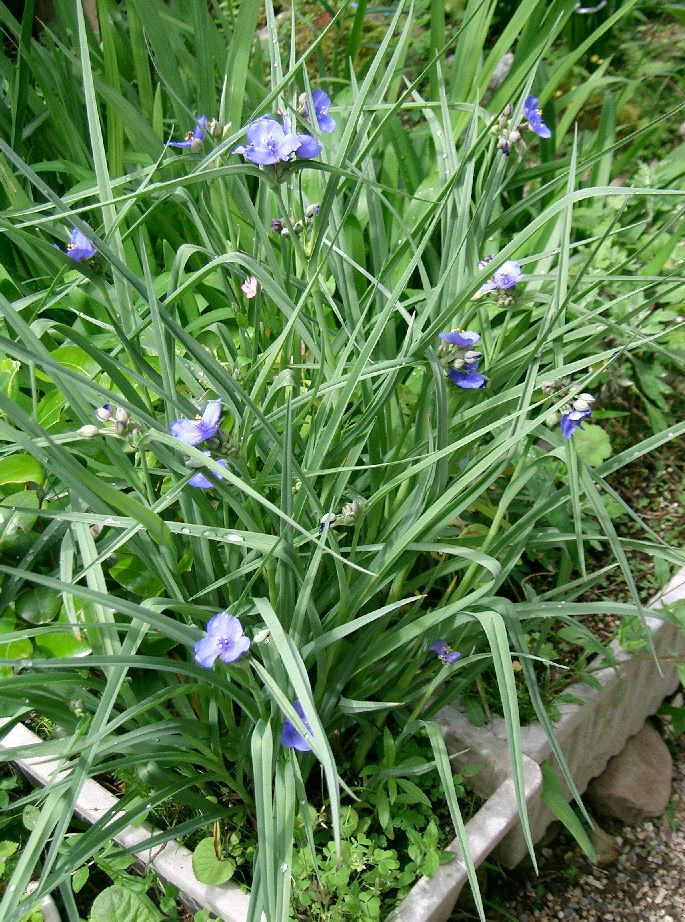 Tradescantia ohiensis